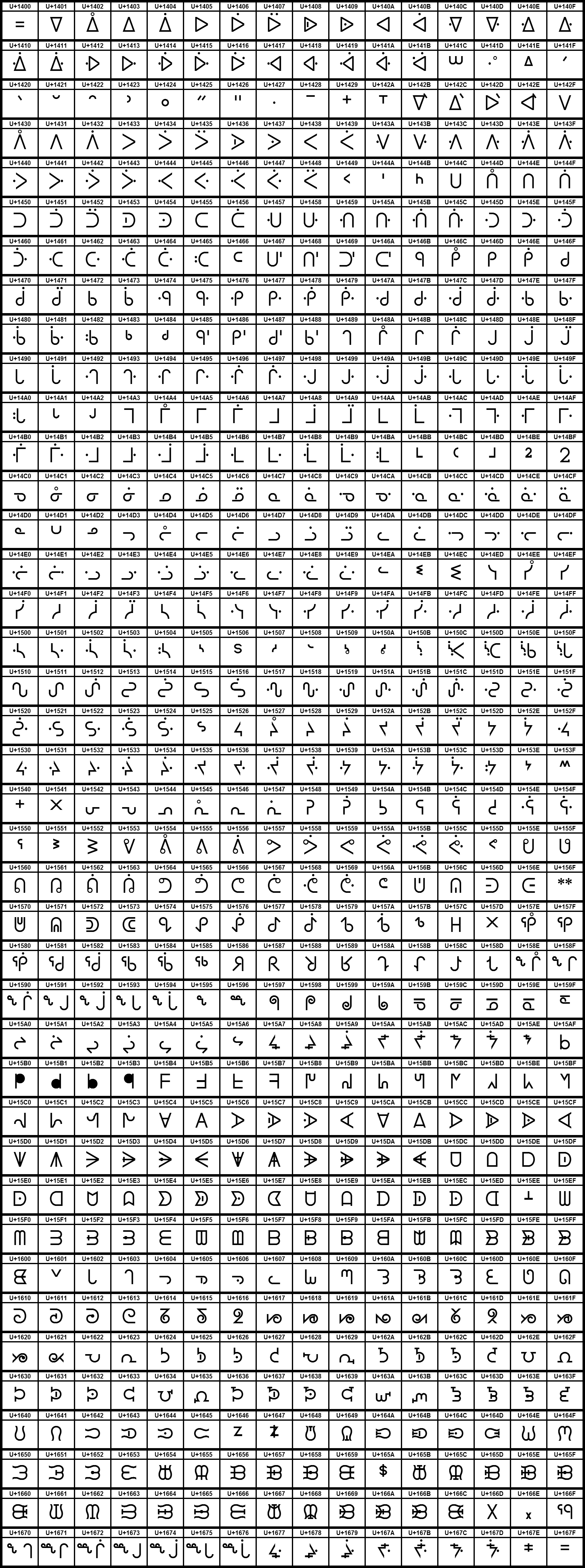 Grafiktafel für den Unicodeblock Vereinheitlichte Silbenzeichen kanadischer Ureinwohner.